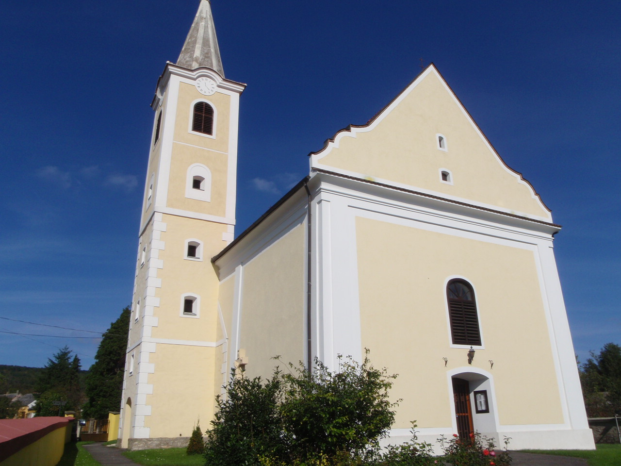 Bozsok Szent Anna rk templom műemlék